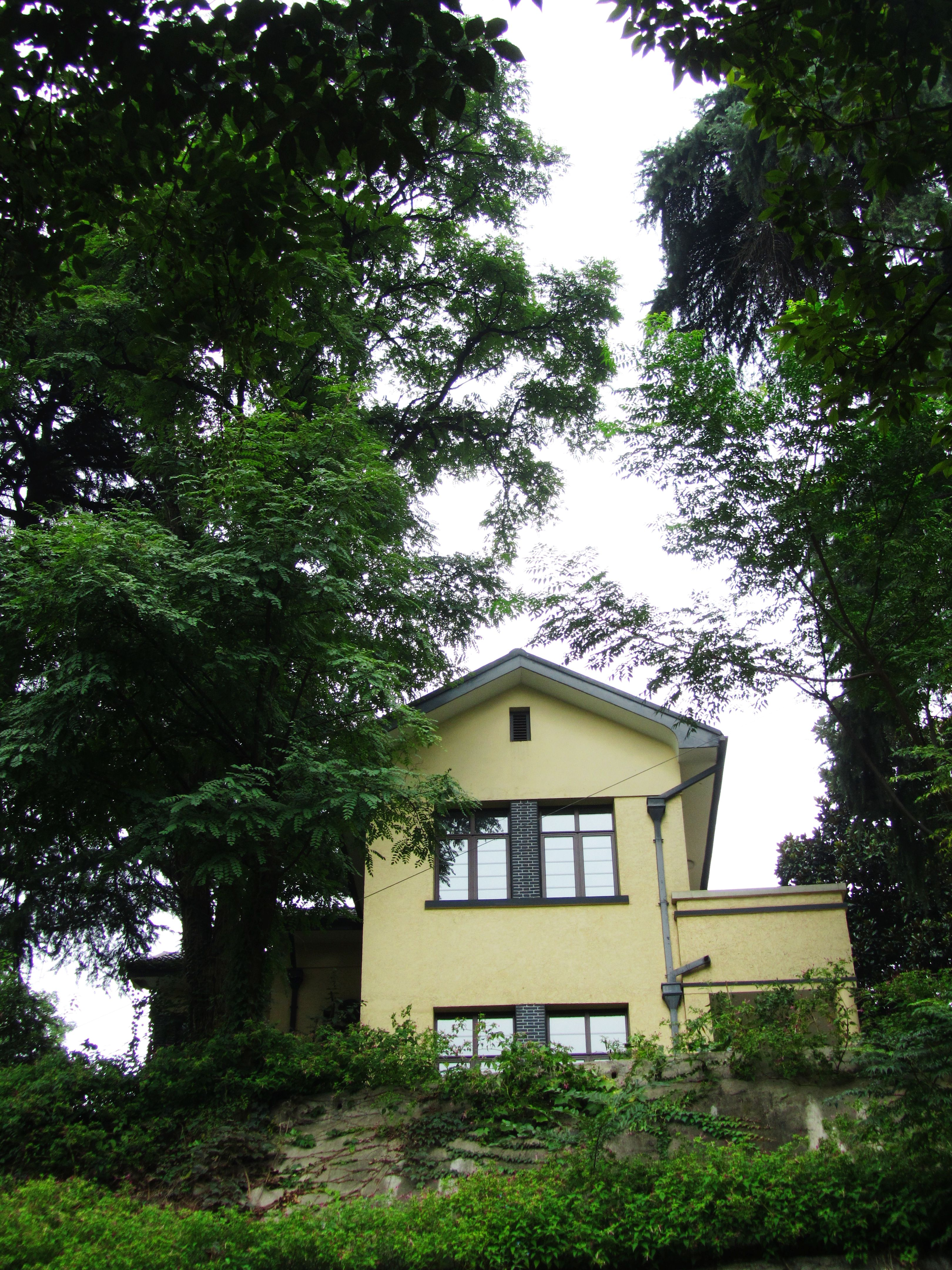 南京汉口西路傅抱石旧居。